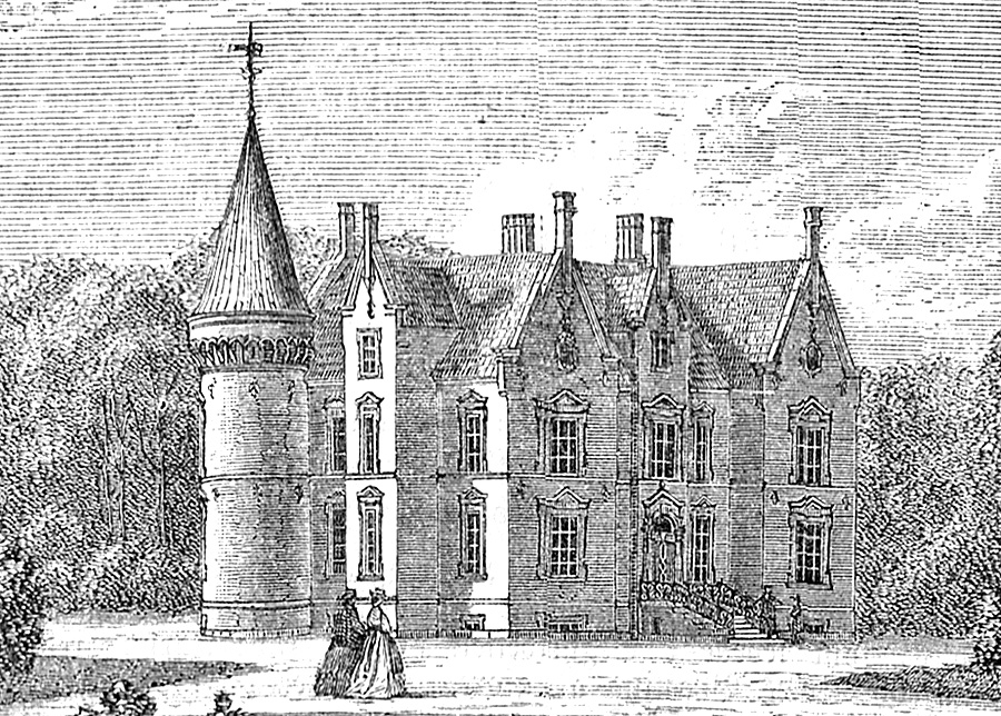 Knuthenborg er en gammel hovedgård, som blev kaldt Aarsmarke og nævnes første gang i 1372. Grevskabet Knuthenborg er oprettet den 2 marts i 1714. Gården ligger i Hunseby Sogn, Musse Herred, Maribo Amt, Maribo Kommune. Hovedbygningen er opført i 1865-66